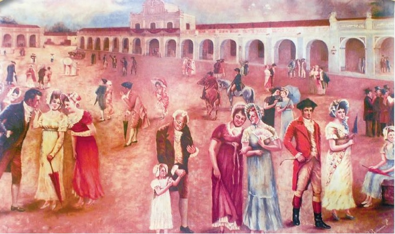 Plaza de Armas luego de la firma de la declaratoria de la independencia el 15 de septiembre de 1821.